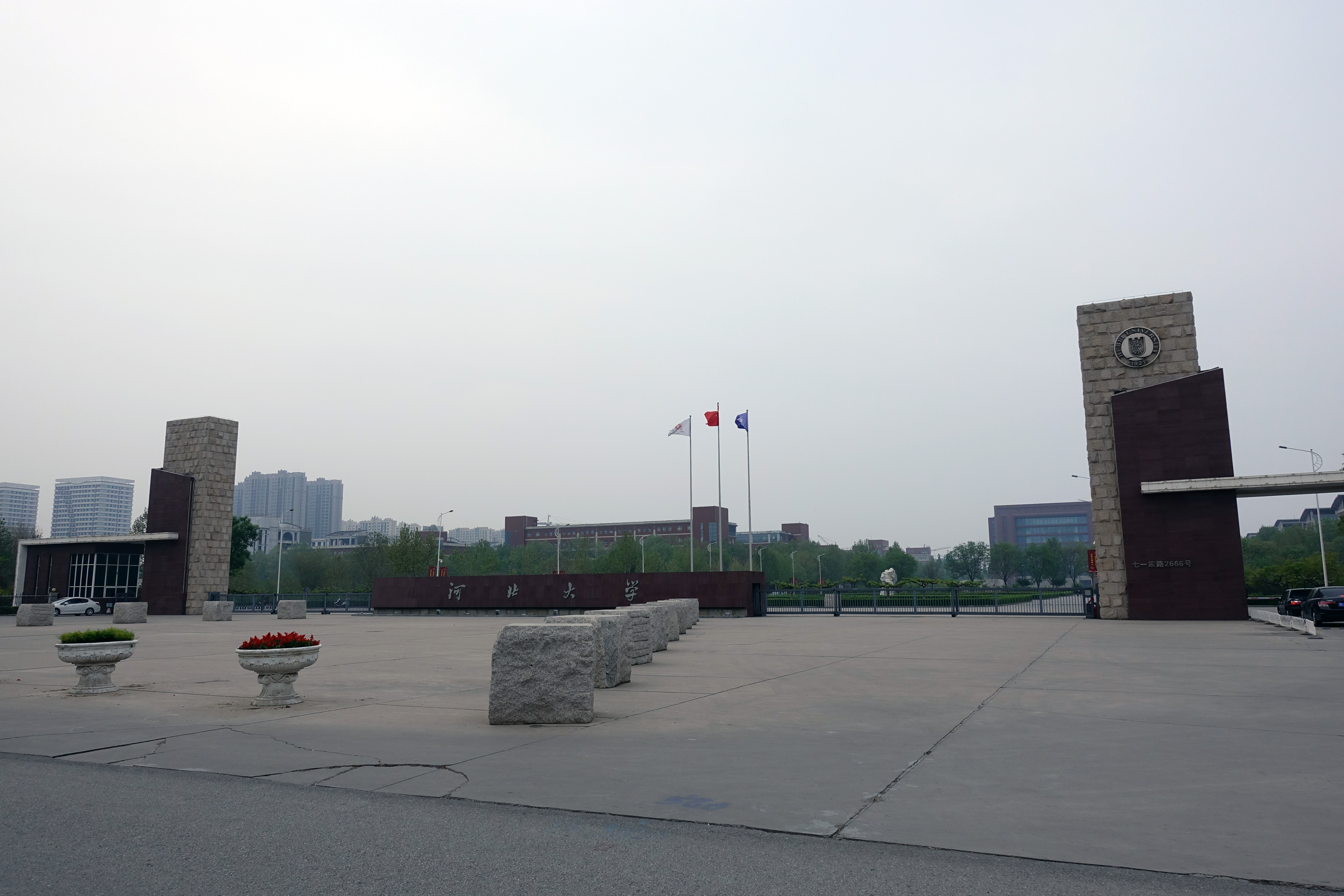 河北大学新区，河北省保定市